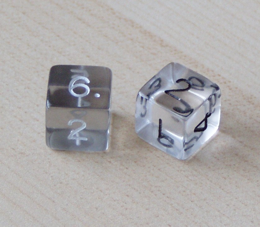 transparent dice